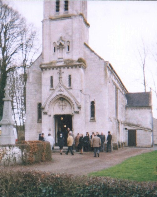 Preĝejo de la vilaĝo Monchy-Caeux foto 2002